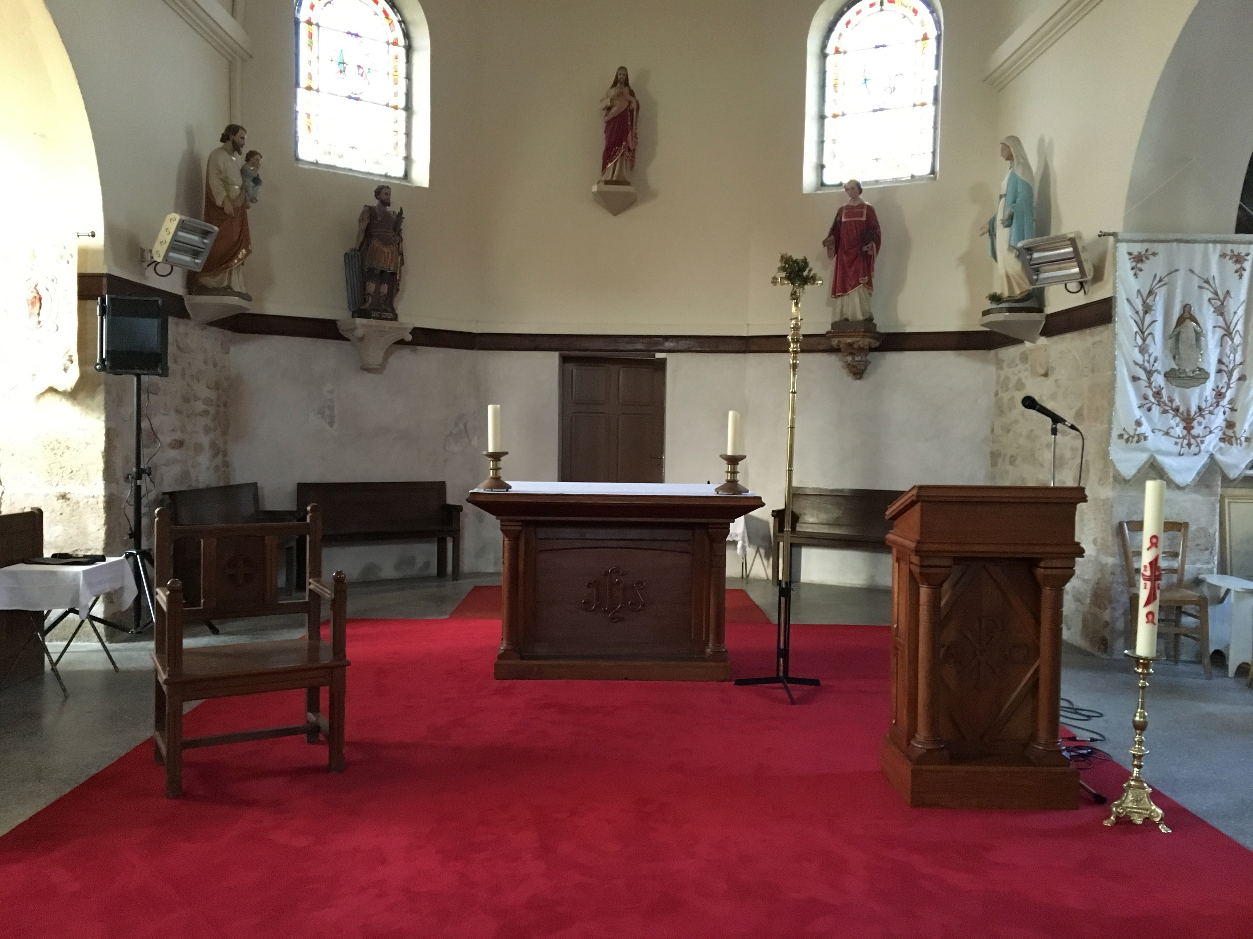 Choeur de l'église de Pouillon en 2016